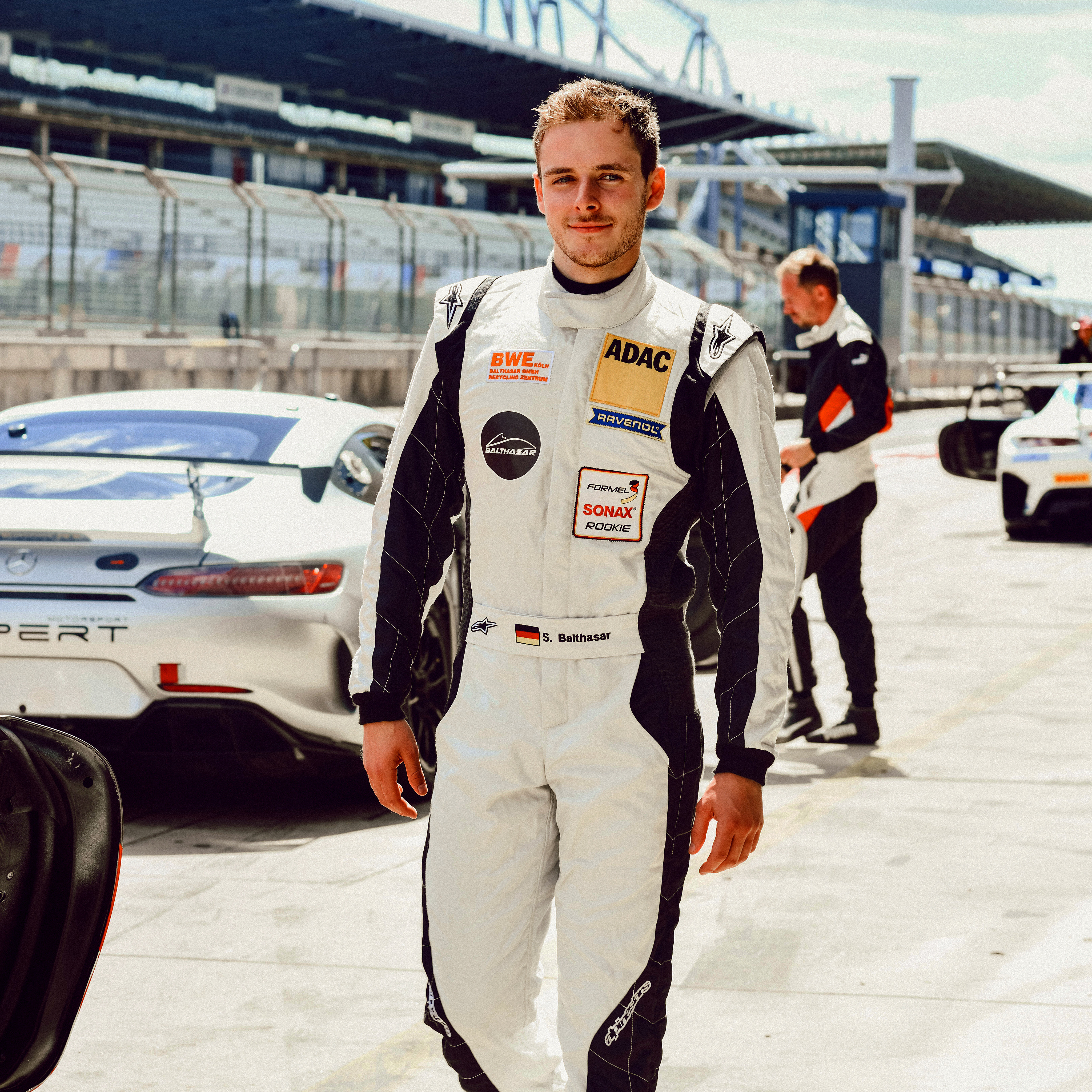 Lamborghini Super Tropheo 2020